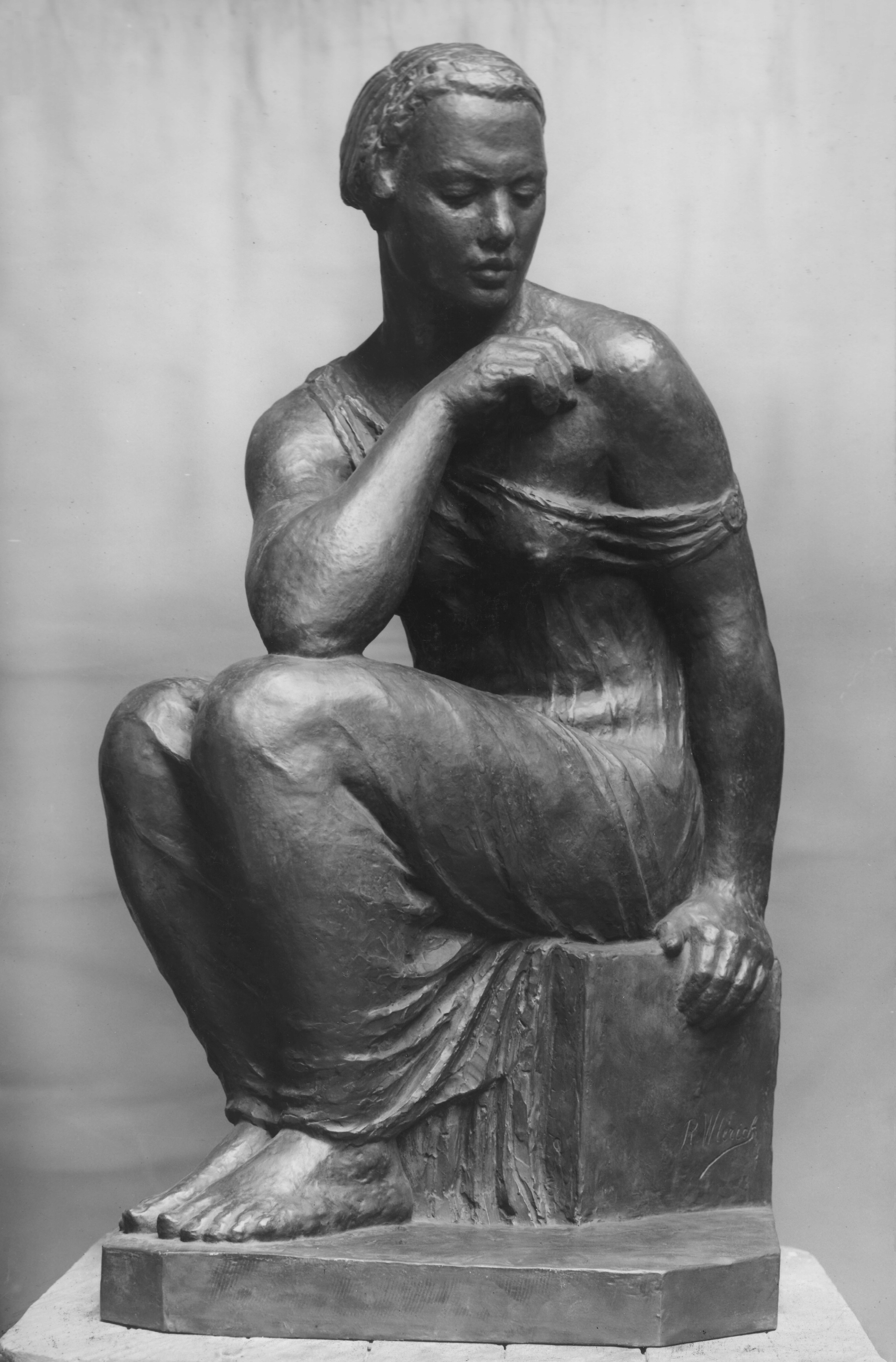 Photo de la figure du monument Victor-Bérard du lycée de Morez.